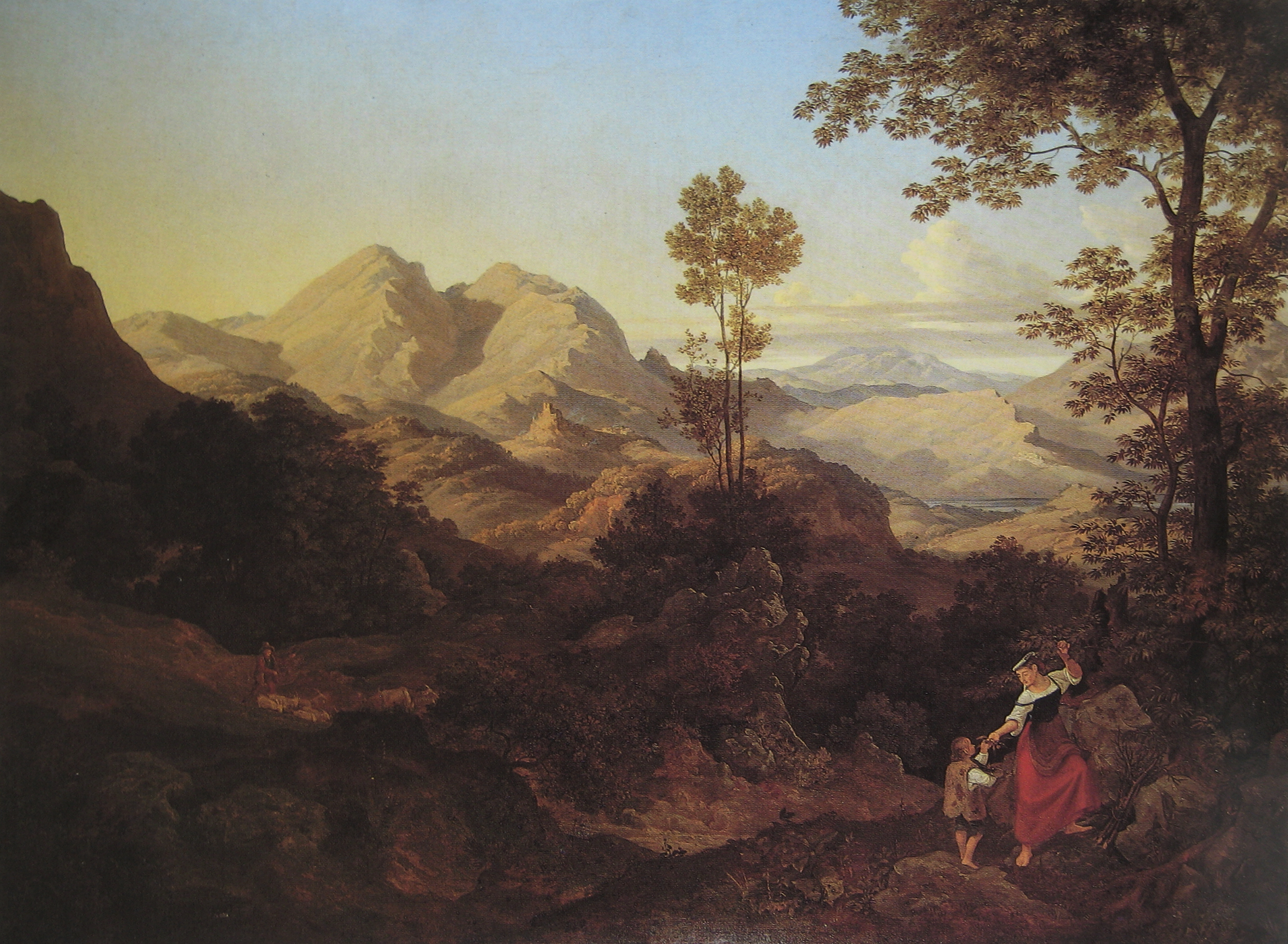 Römische Gebirgslandschaft - Blick aus südlicher Richtung nach der Rocca di Mezzo in den Sabiner Bergen mit der vorgelagerten Felsenstadt Civitella.